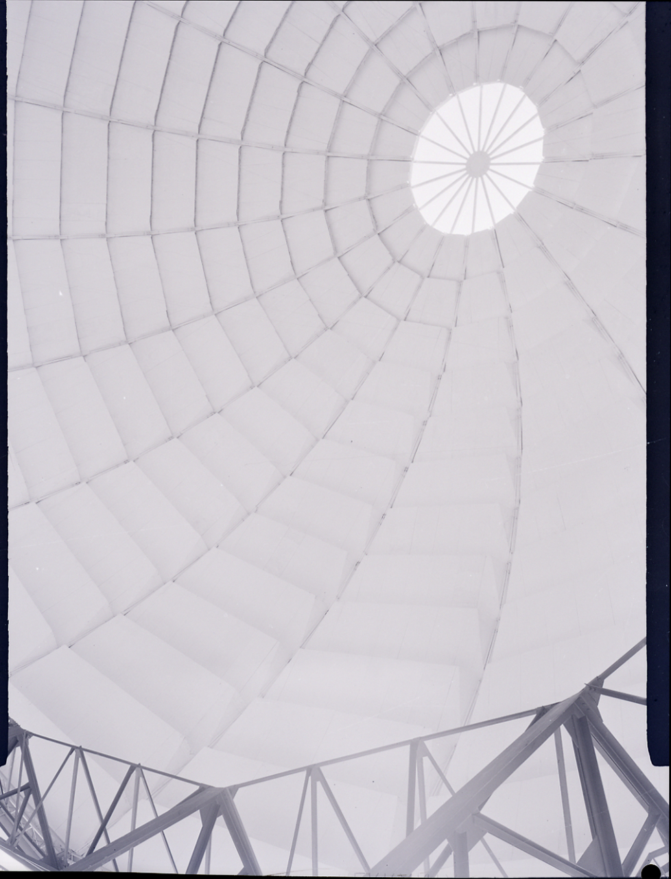 Servizio fotografico : Italia, 1965 / Paolo Monti. - Buste: 6, Fototipi: 6 : Negativo b/n, gelatina bromuro d'argento/ pellicola ; 10x12. - ((Serie costituita da 6 buste di negativi, identificati con una doppia numerazione (da 102 a 105): 3707, 3708, 3709, 3710, 3711, 3712, e tenute insieme con da una graffetta. - Sul coperchio della scatola iscrizione didascalica manoscritta a penna: "Arch. Pozzi". - Fonte: Quaderno ad anelli di Paolo Monti: s.t. [Soggetti e committenti] (1956-1961), presso Archivio Paolo Monti